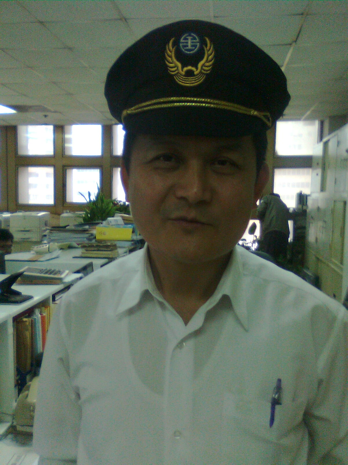 戴著制帽、乘務休班的臺灣鐵路管理局司機員，制帽徽章及圖樣為臺鐵標誌及象徵速度的放射狀線條。